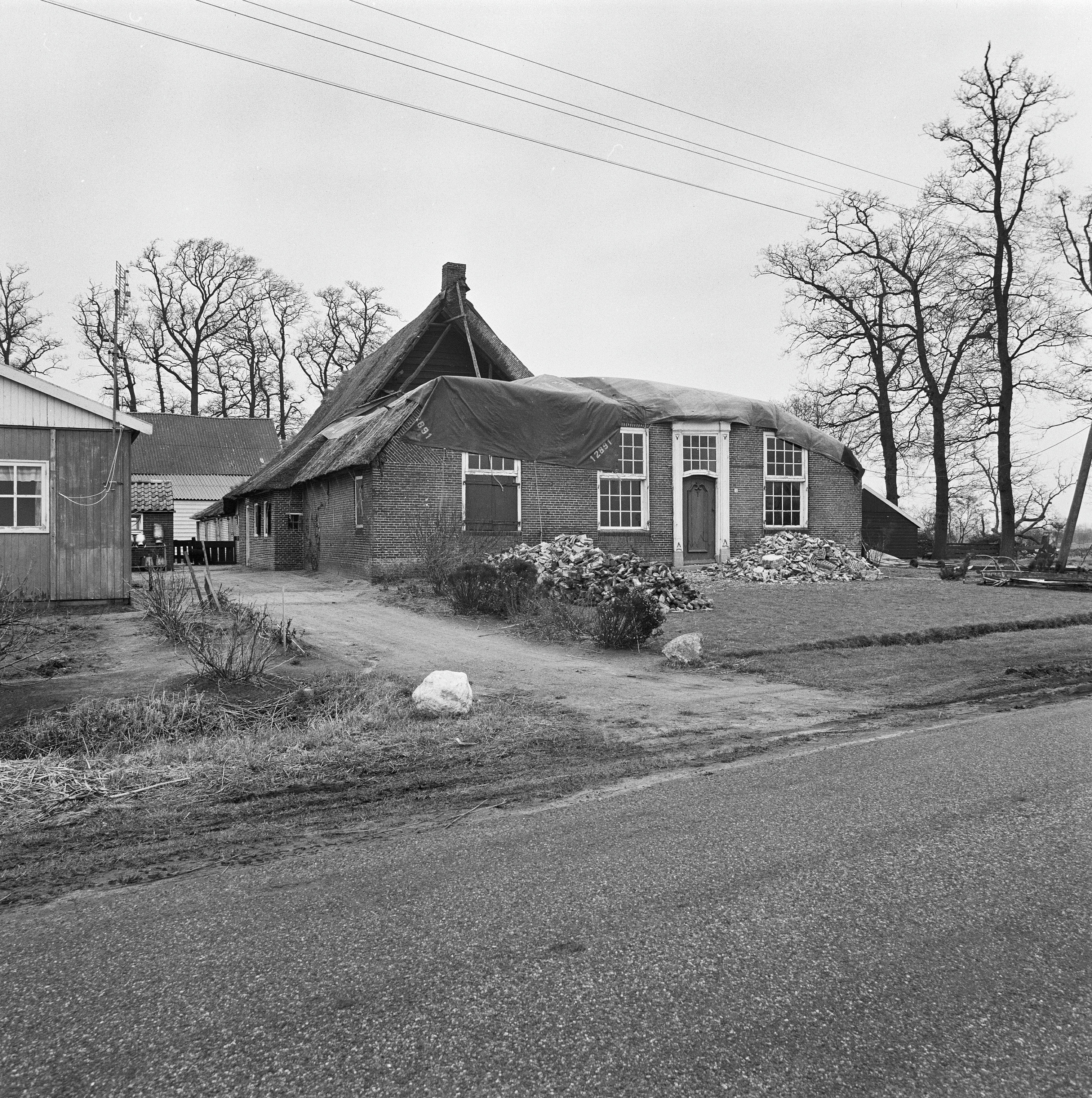 boerderij na stormschade, november 1972